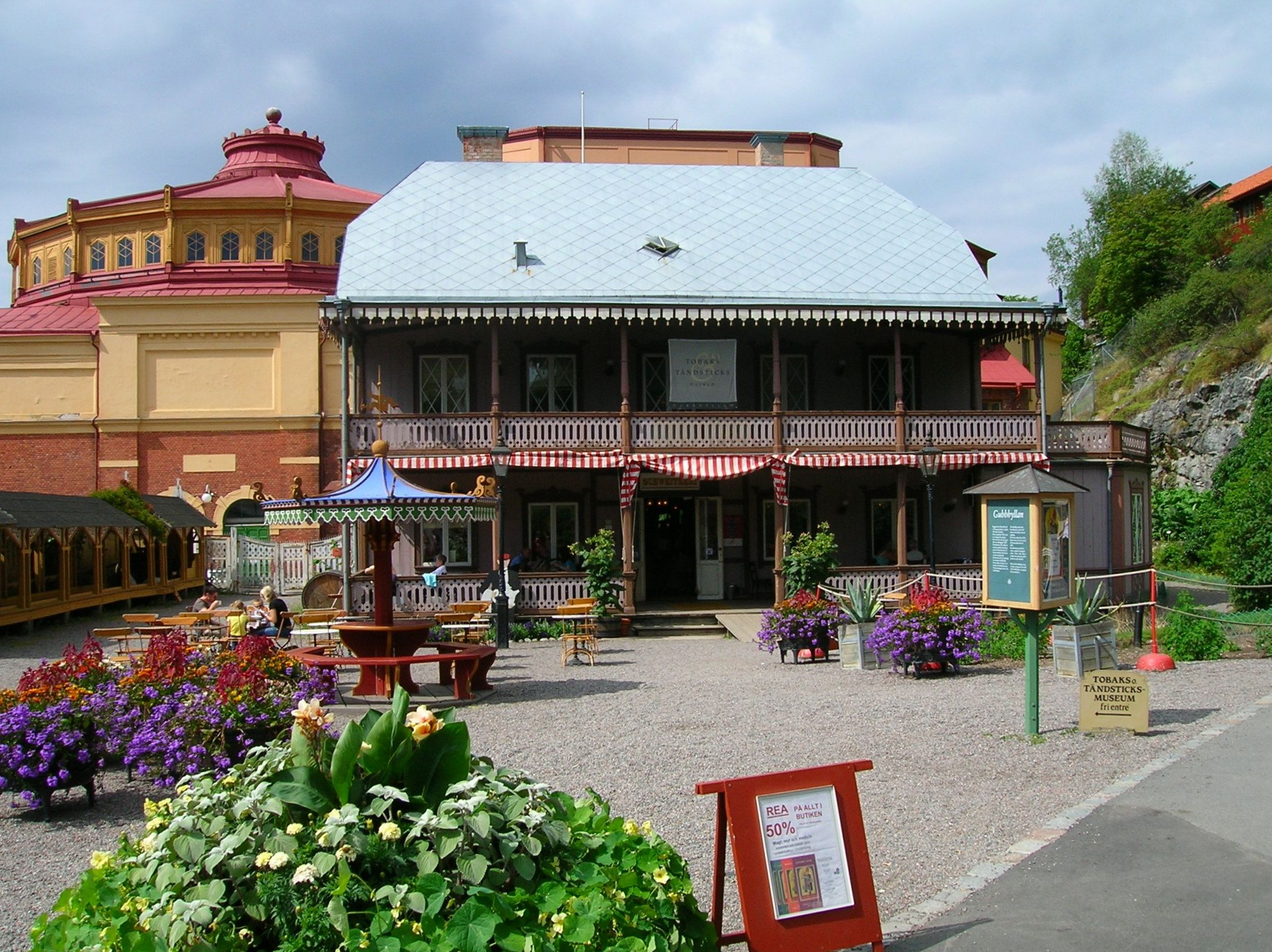 Gubbhyllan, cafe och tobaks/tändsticksmuseum, Skansen, Stockholm